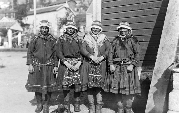 Fire svenske samekvinner fra Wirijaure/Stalluoktatraktene utenfor butikken i Furulund i Sulitjelma. Etter at Grubene åpnet handel, var det vanlig at svensksamene både fra Wiri og Mavas lengre sør gjorde sine innkjøp i Sulitjelma, en brøkdel av veien til svenske handelssteder. Bak er jernbanestasjonen. 1916 - 1930 NM.F.008621-00026